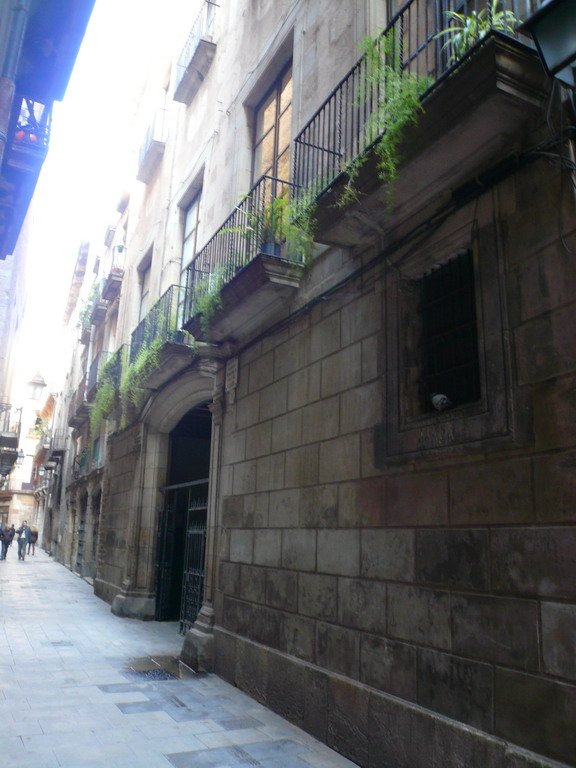 Palau Mercader